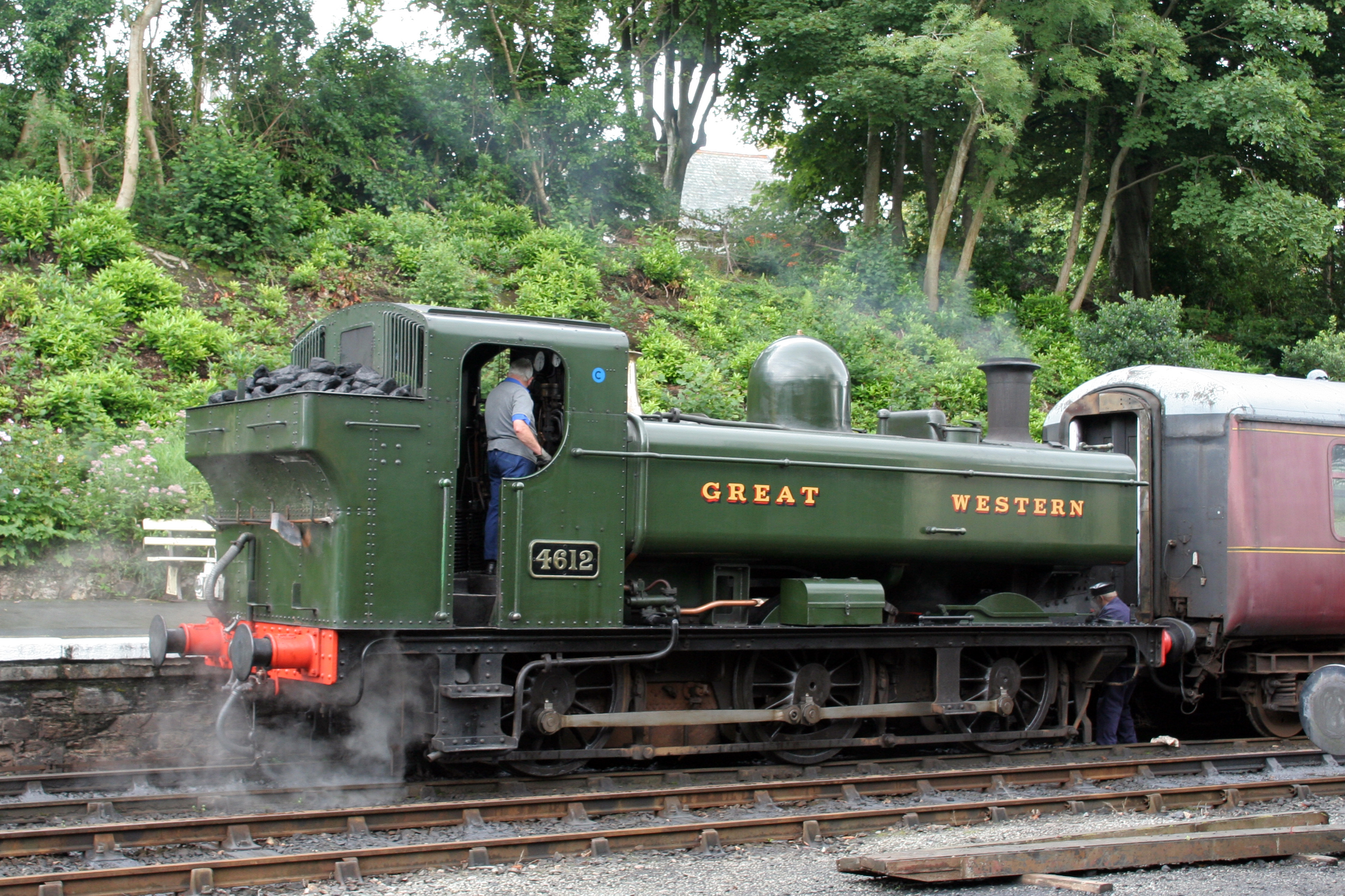 Pannier 4612 4